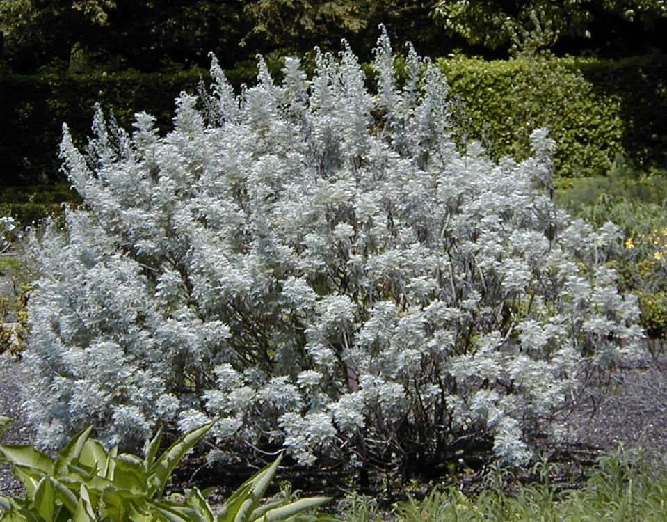 Artemisia arborescens. Real Jardín Botánico de Madrid